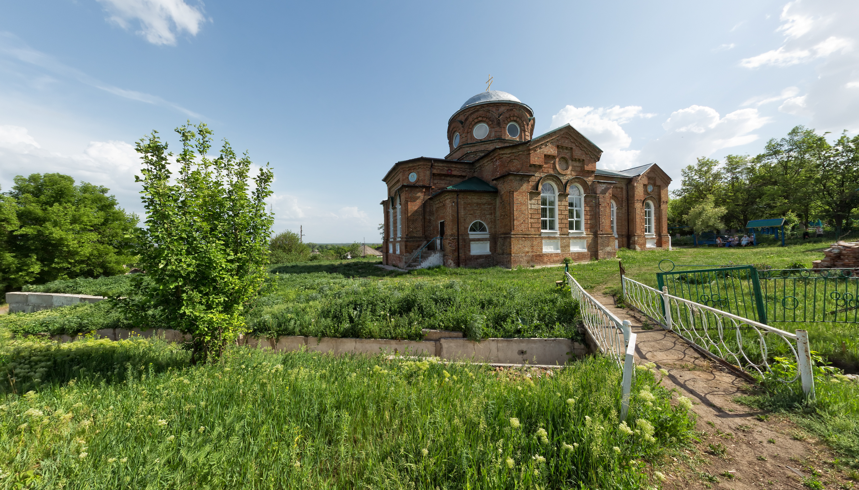 Церква св. Феодосія (мур.), село Михайлівка